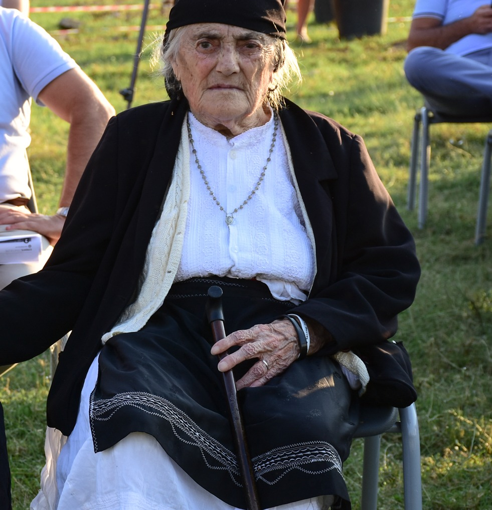 Gjelë Gjikola fotografuar nga Loreta Cuka.